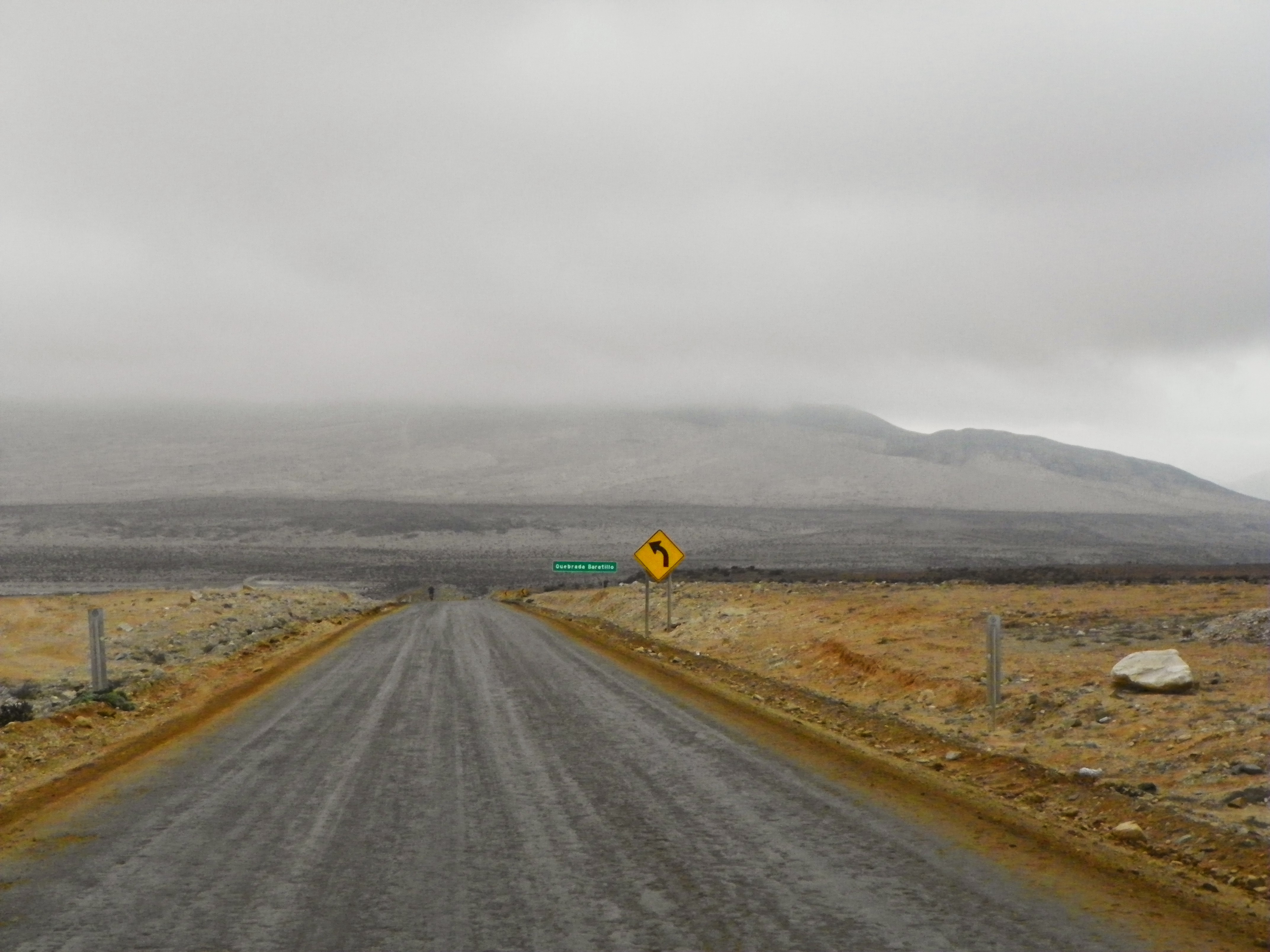 Ruta Carrizal Bajo a Huasco, Chile